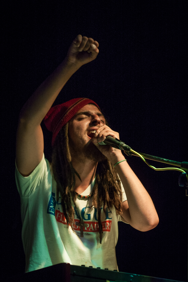 Michal Šeps na VyOsení v Dubňanech.